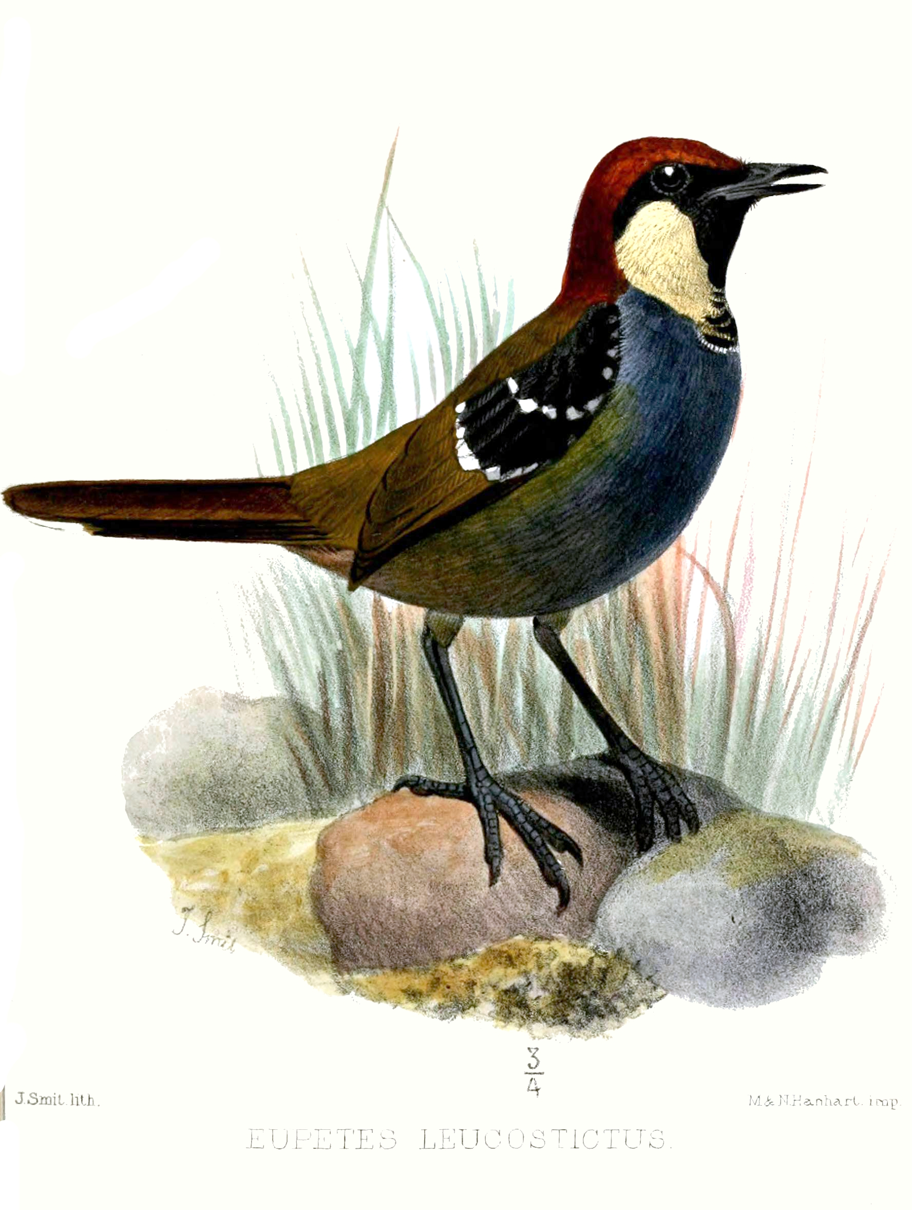 Eupetes leucostictus = Ptilorrhoa leucosticta